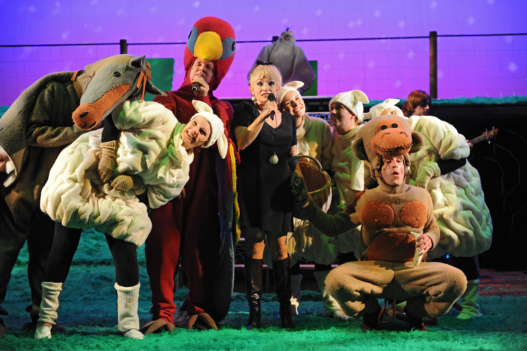 Musical "Meta, Norddeich" Landesbühne Niedersachsen Nord